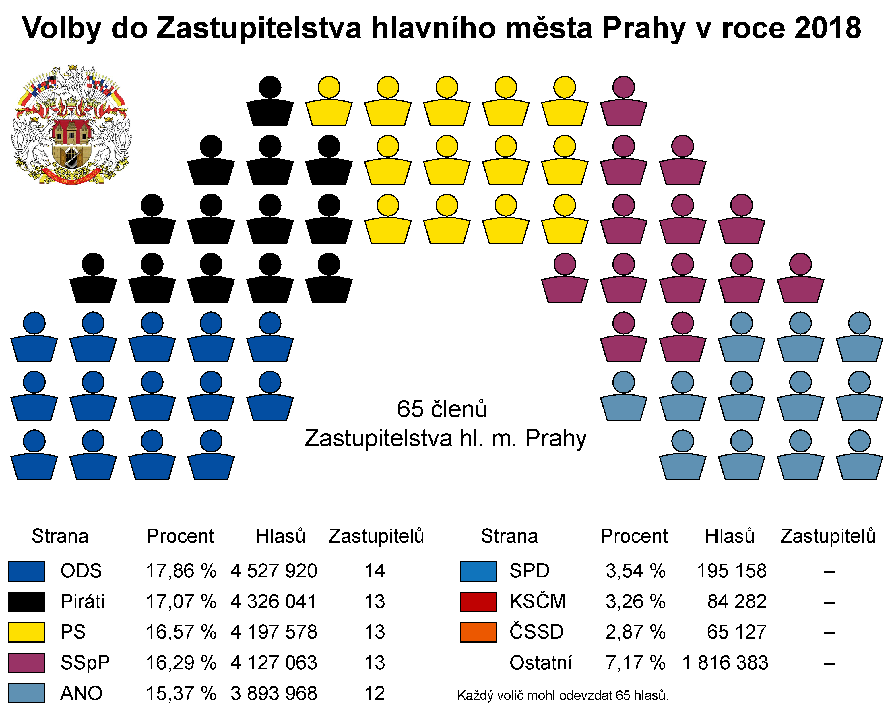 Přehled obsazení mandátů dle voleb do zastupitelstva hl. m. Prahy v roce 2018.